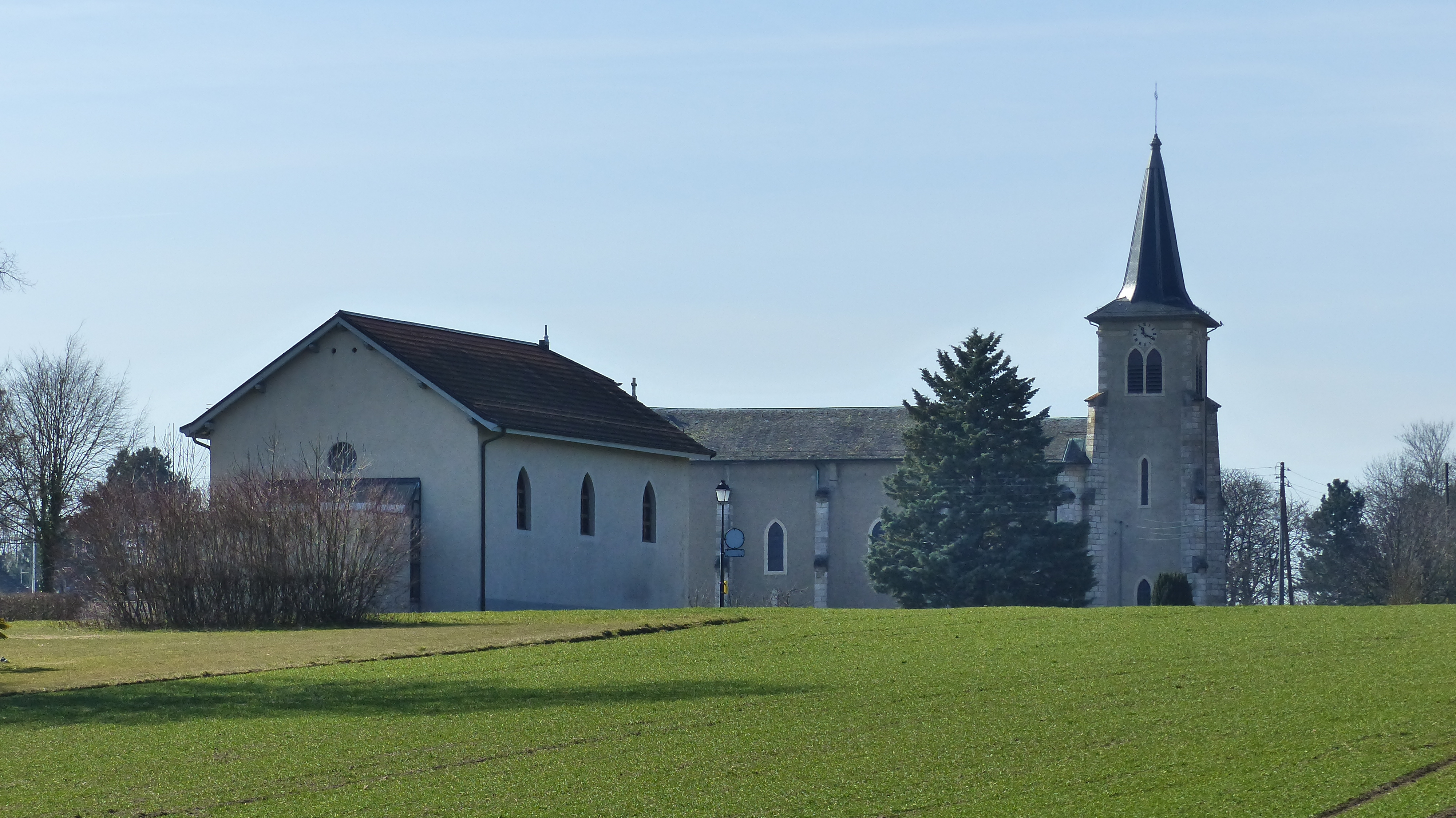 Kapelle und Kirche in Collex